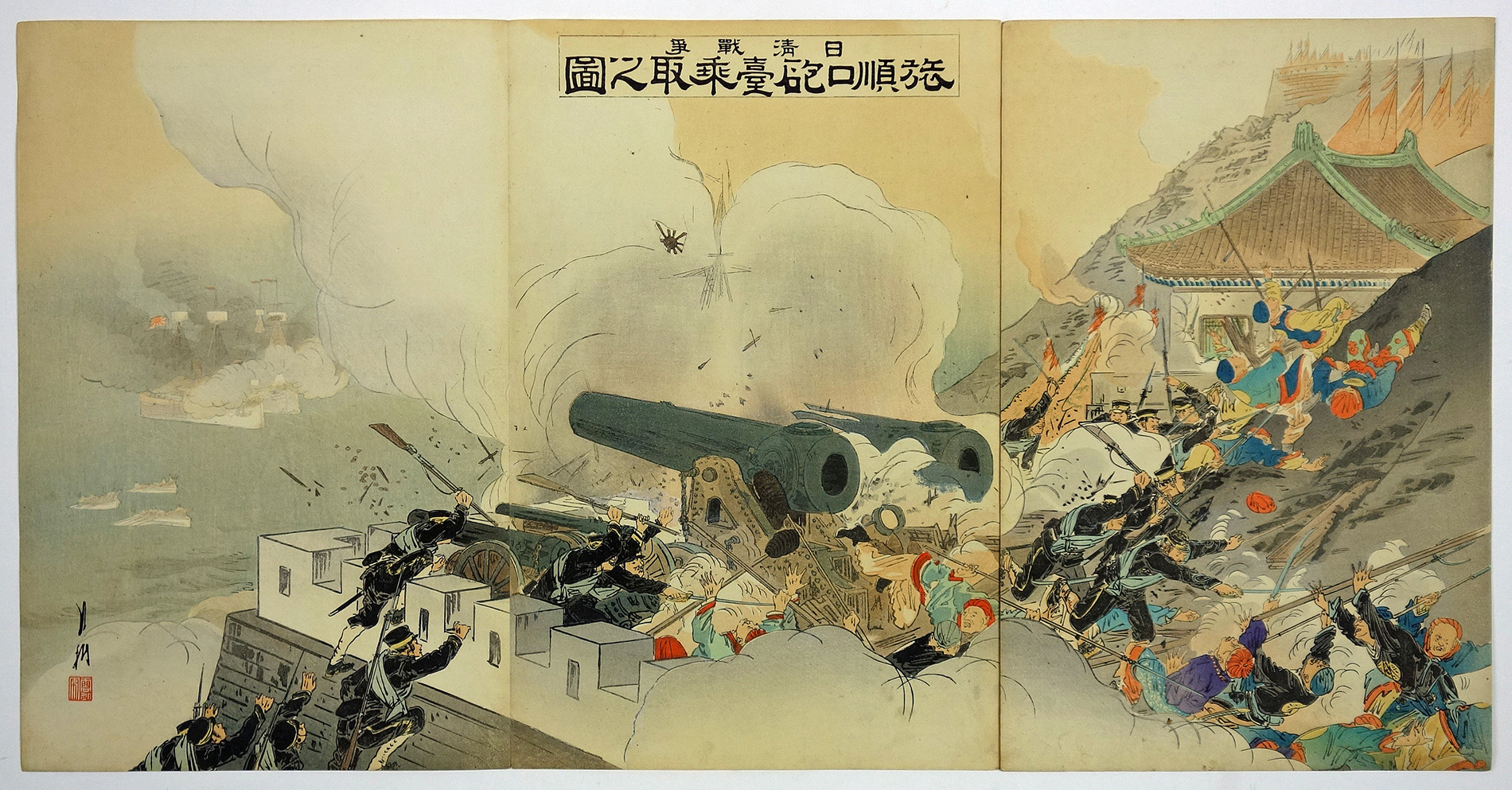 1895 painting